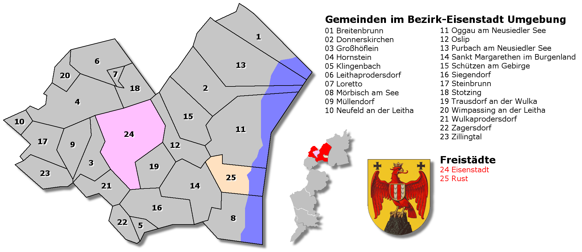 Gemeindekarte Bezirk Eisenstadt-Umgebung (Burgenland, Österreich)